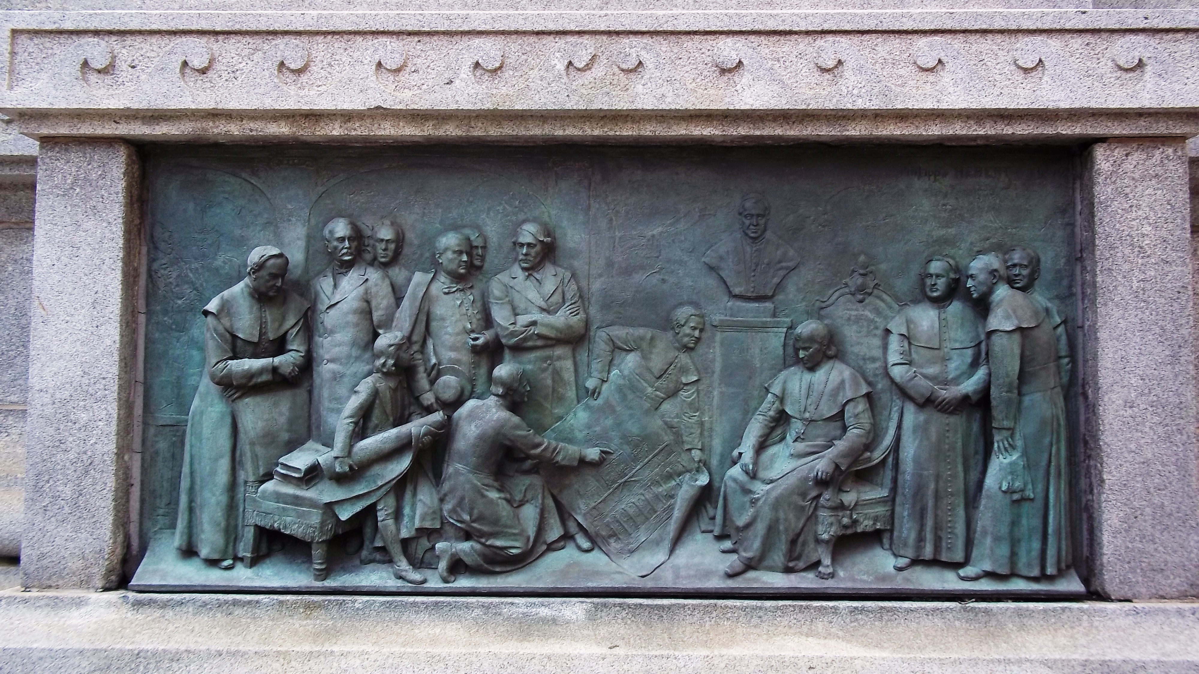 Monument à Ignace Bourget, situé devant la Basilique-cathédrale Marie-Reine-du-Monde, boulevard René-Lévesque Ouest, Montréal